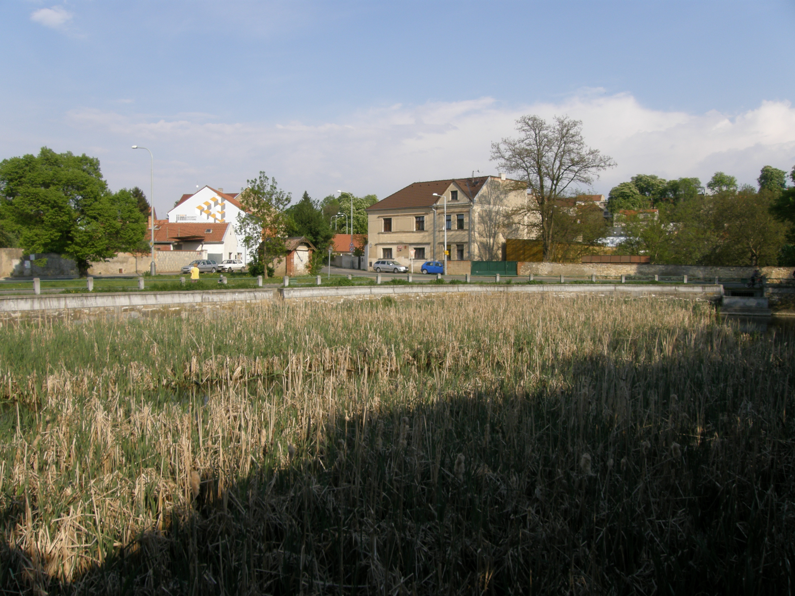 Praha-Jinonice, Butovice, Butovický rybník na bývalé návsi